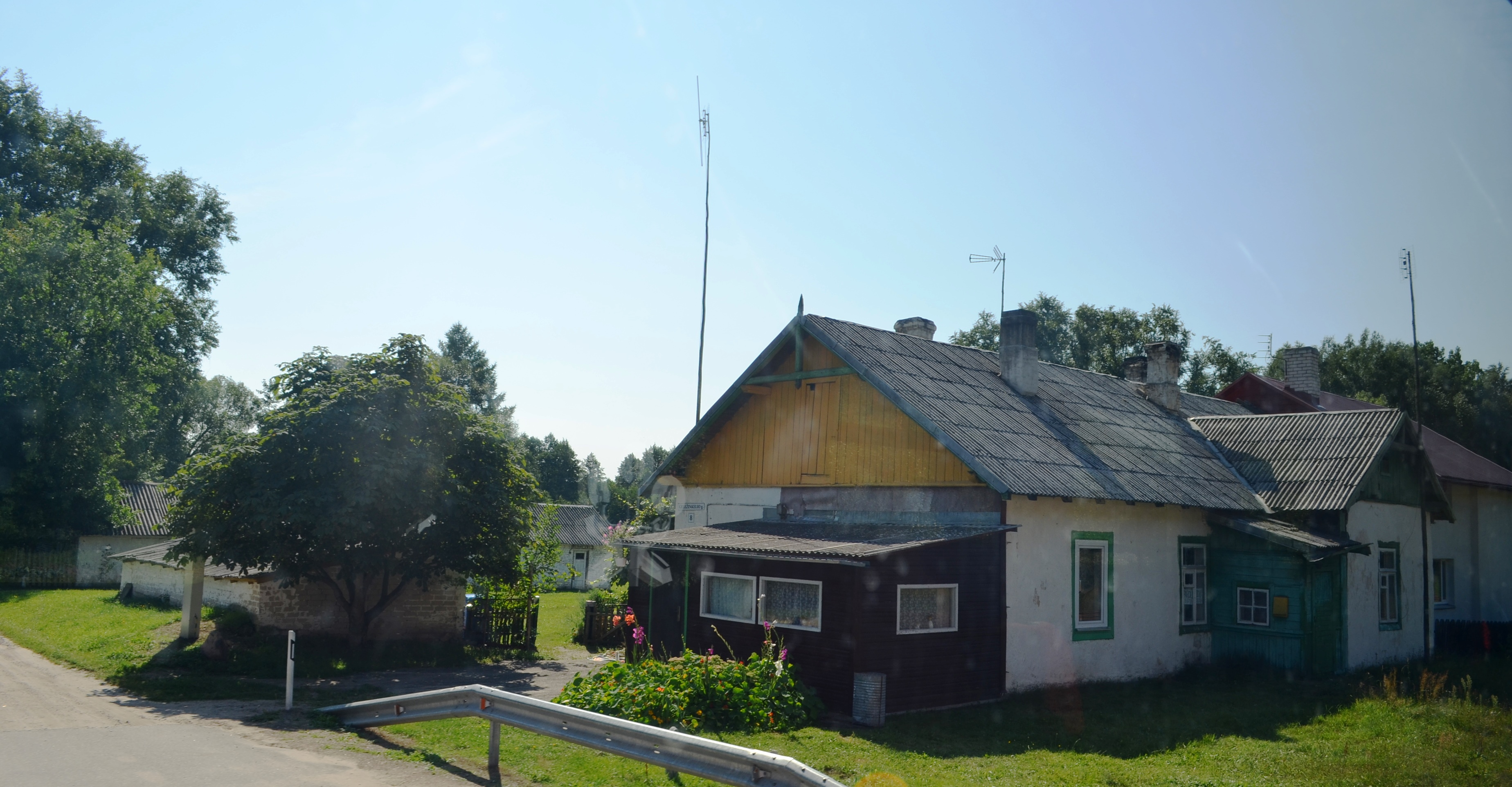 Pamerkiai, Varėnos raj. Vaizdas iš traukinio